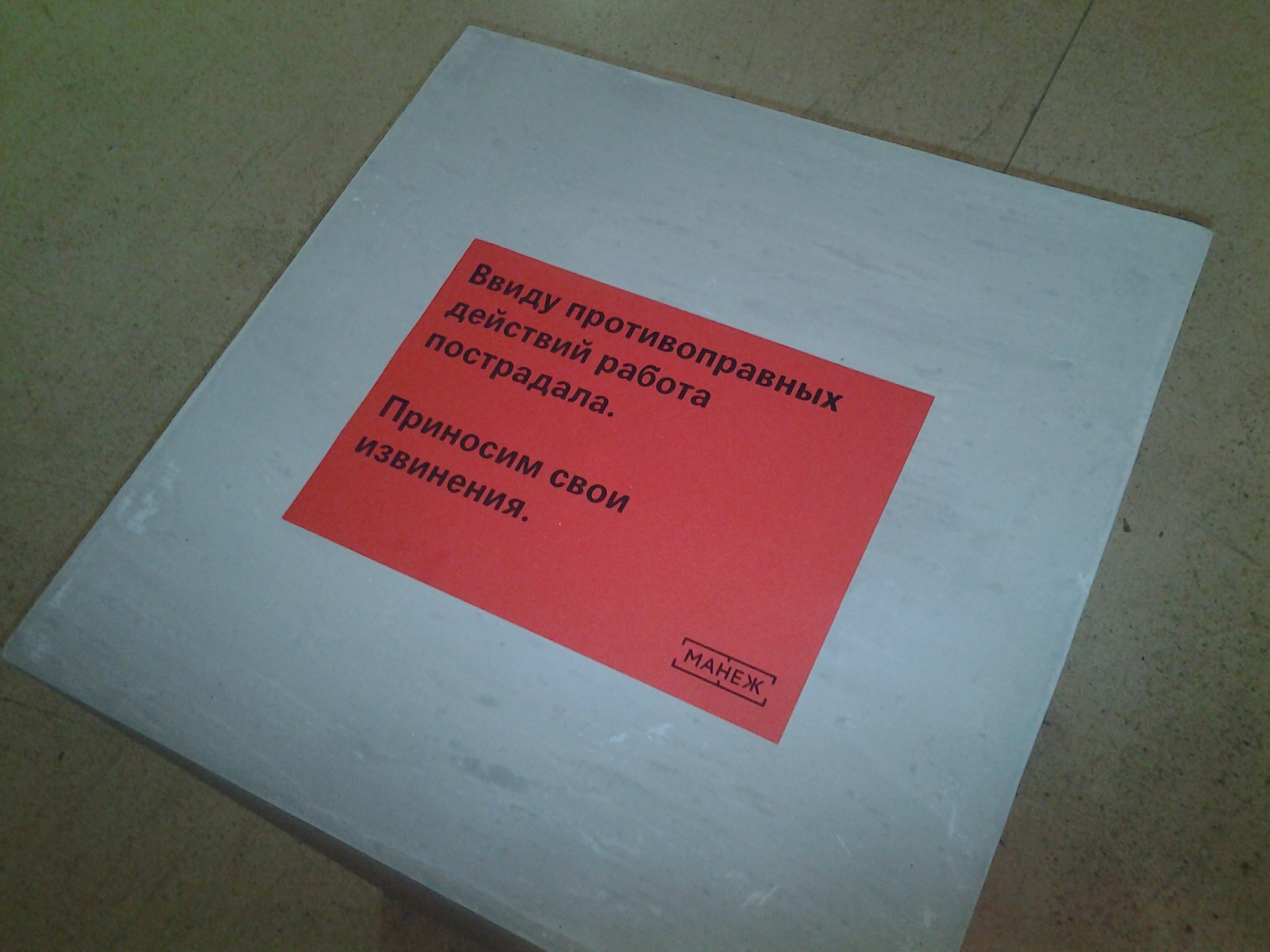 Табличка с тумбы, на которой стоял экспонат, подвергшийся вандализму на выставке «Скульптуры, которых мы не видим» в "Манеже".